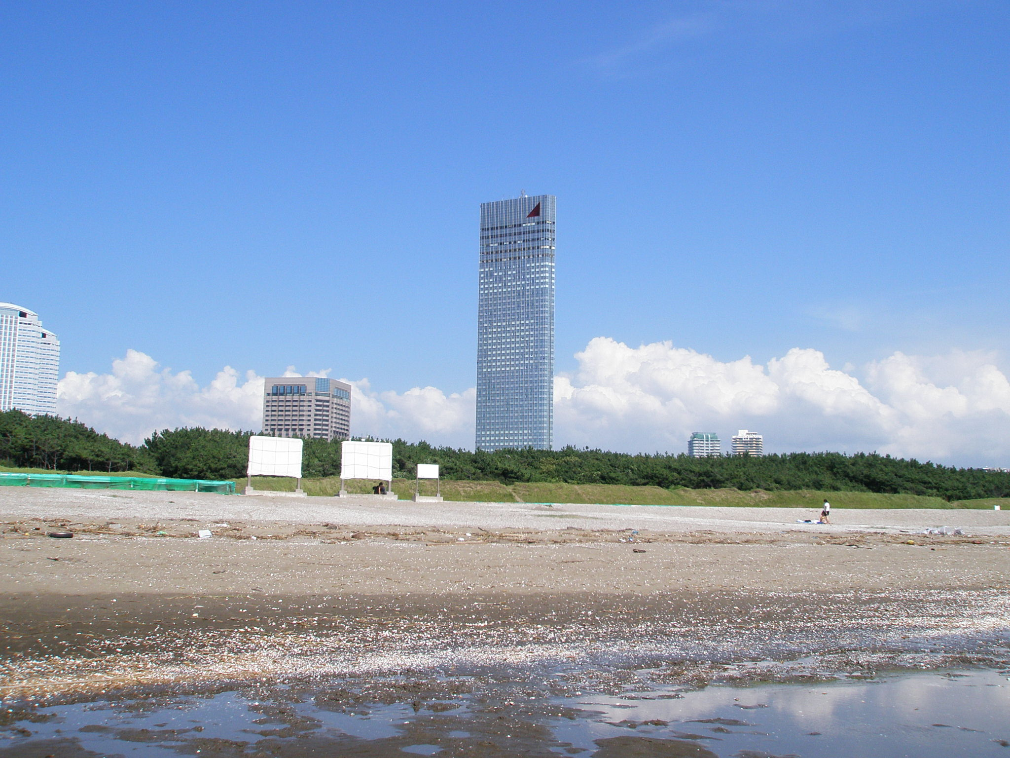 人工海浜「幕張の浜」とアパホテル&リゾート東京ベイ幕張